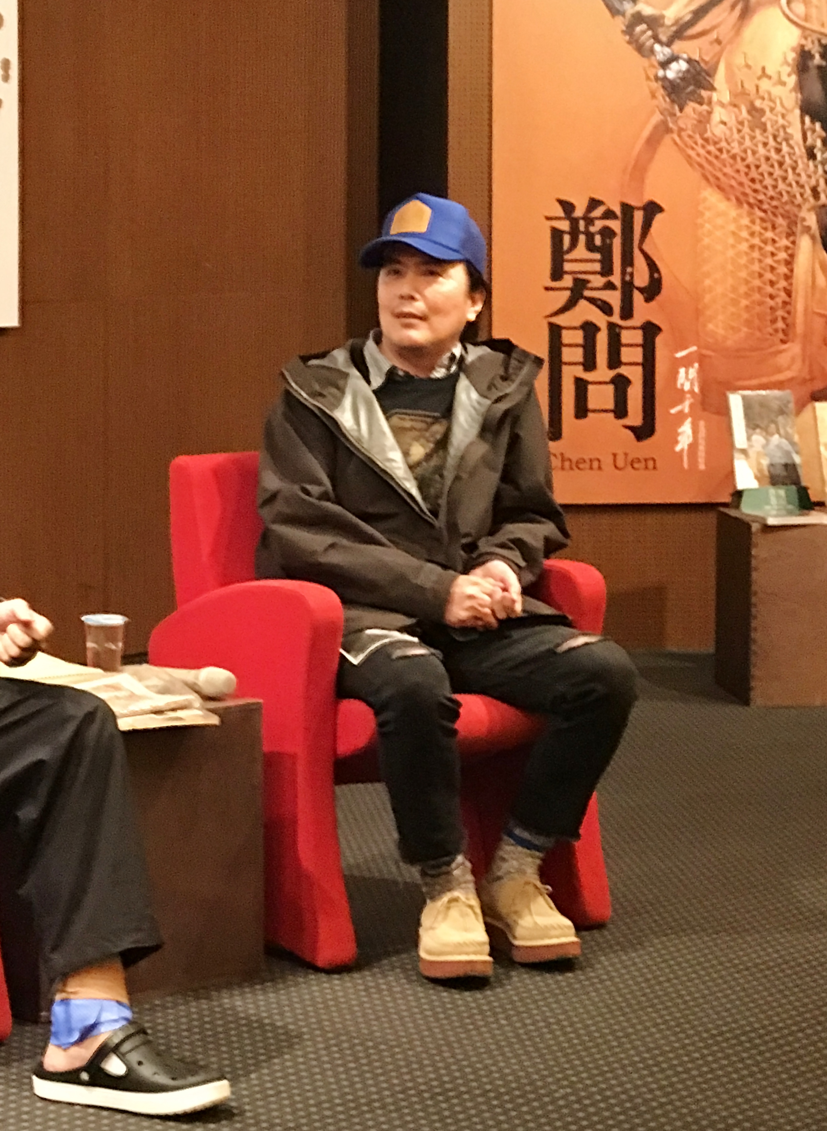 中文（台灣）: 鄭問追思座談會，怜聽麥人杰發言的阿推。